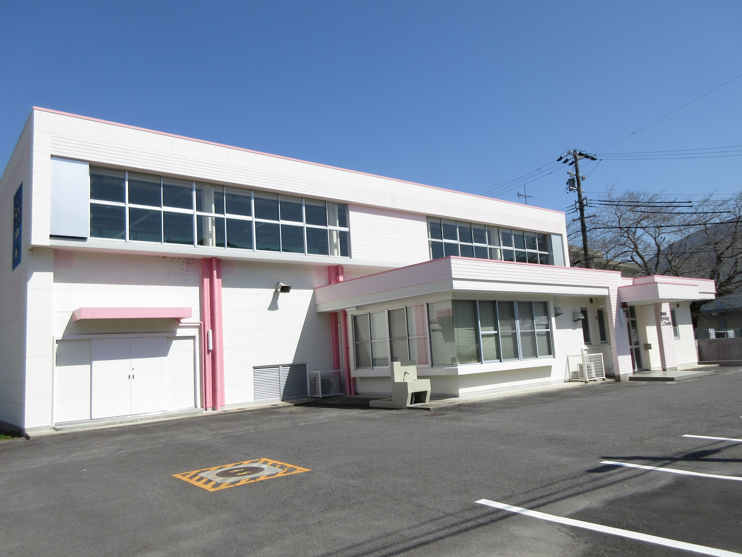 岡崎市生平学区こどもの家（岡崎市生平町）